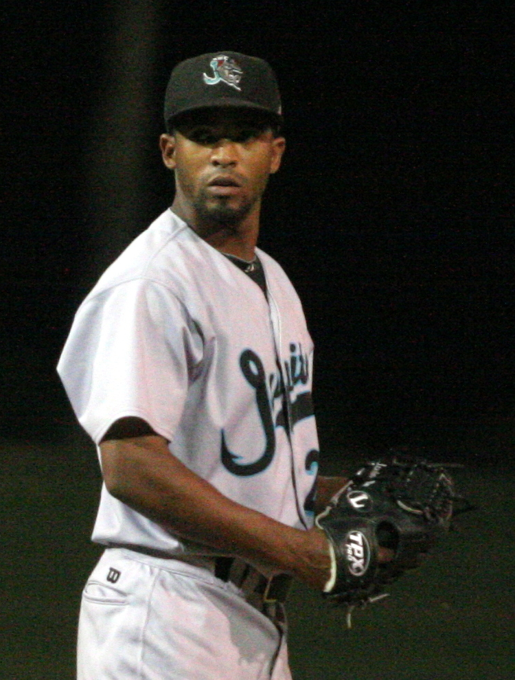 Raudel Lazo